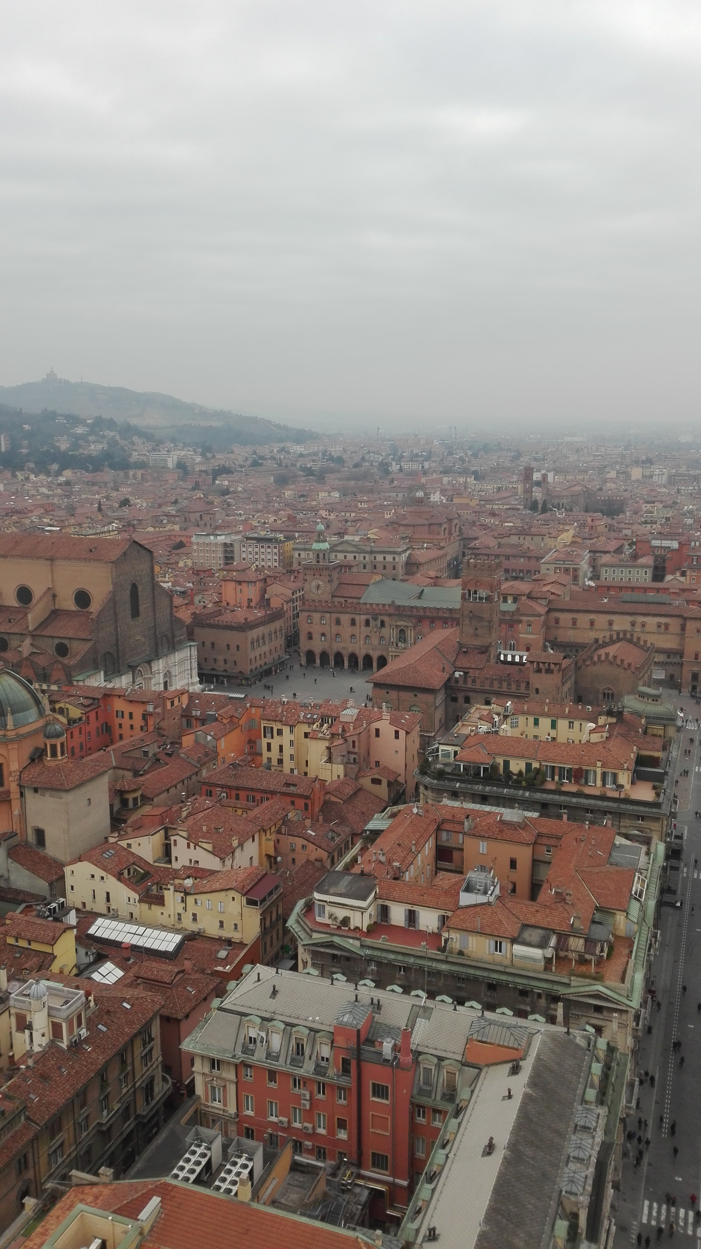 Veduta di Bologna dalla vetta della Torre degli Asinelli